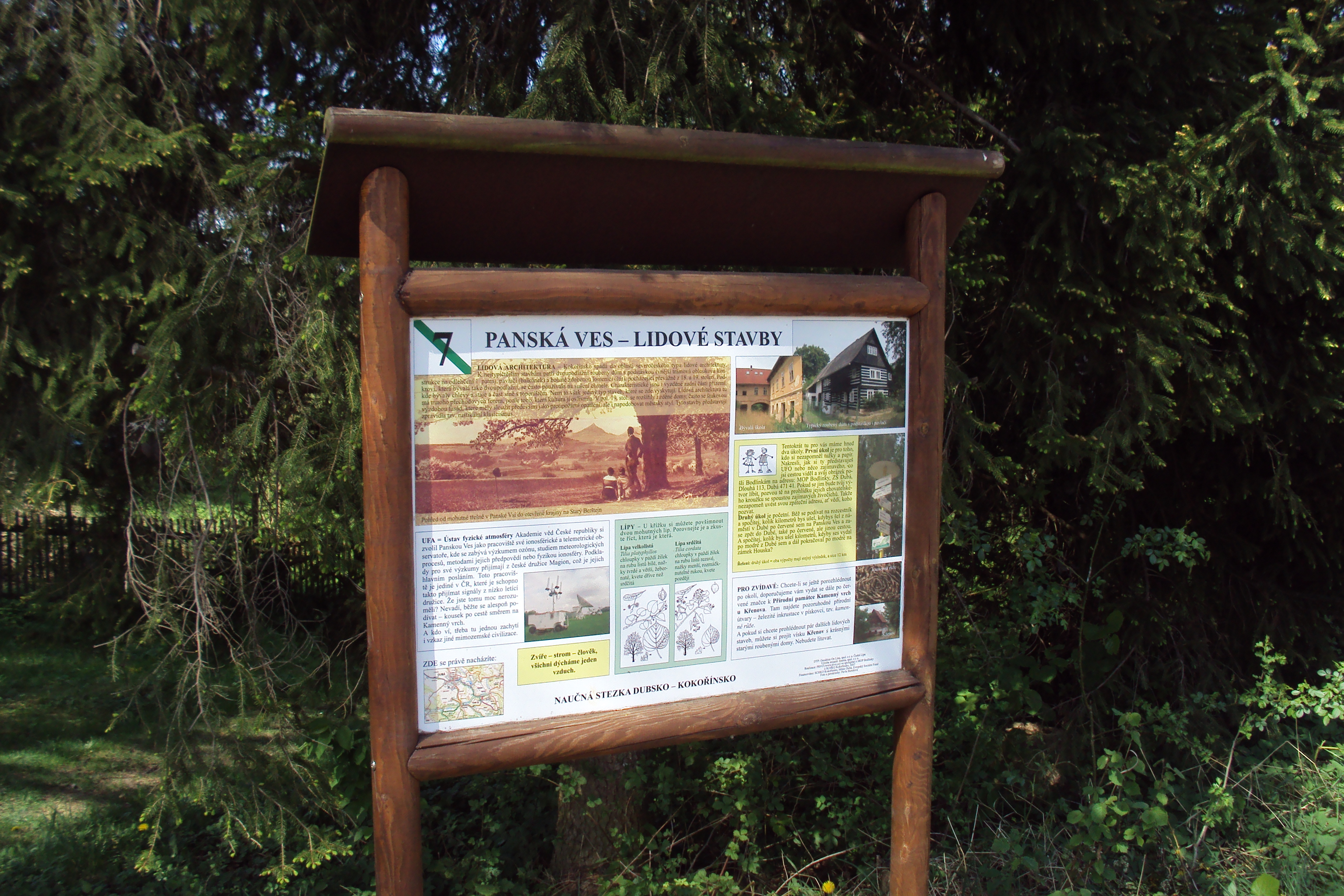 Na návsi vesnice je tablo naučné stezky Dubsko-Kokořínsko